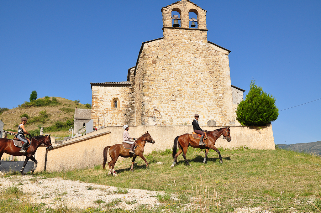 Église de Clumanc 02